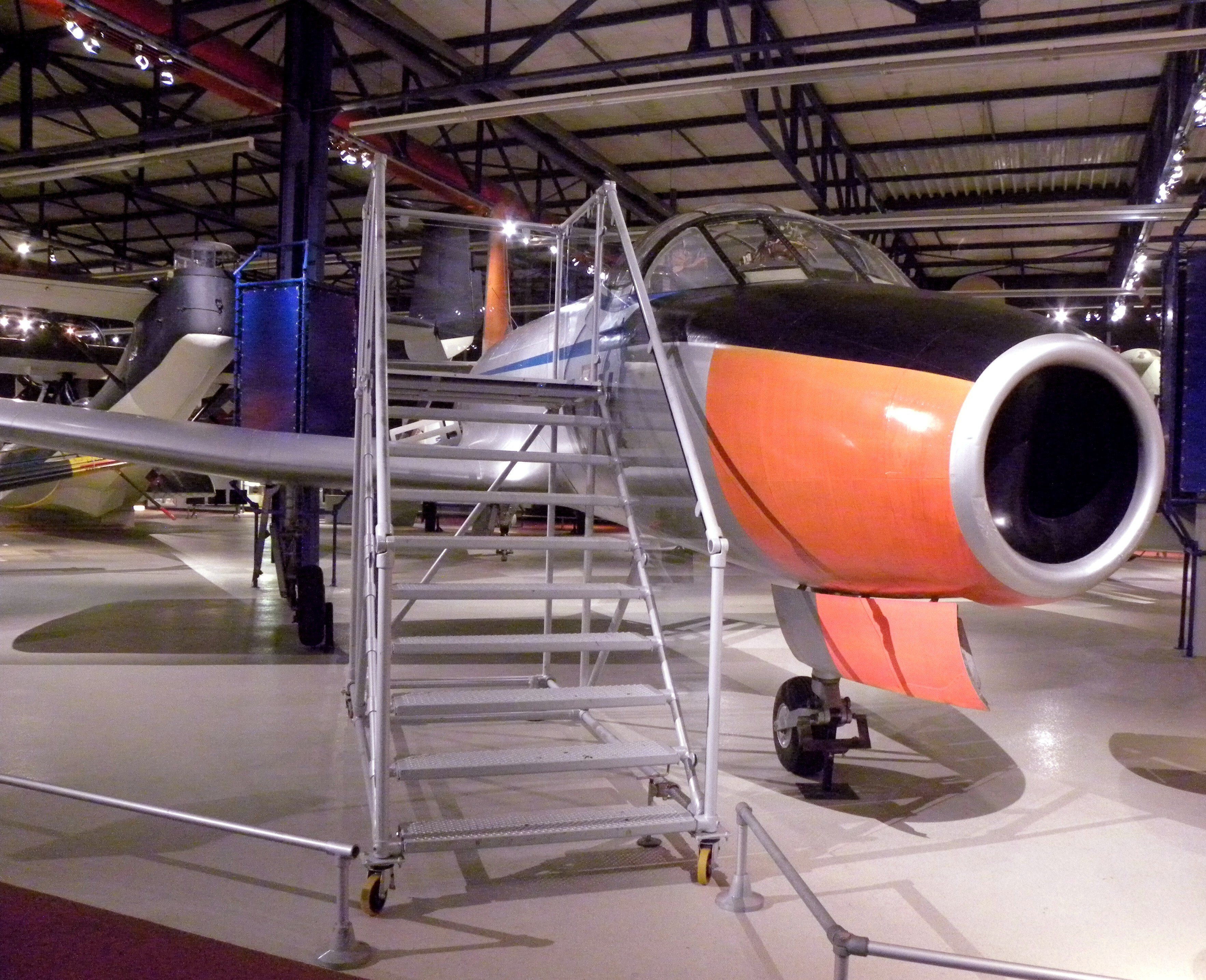 Fokker S-14 seen at militare luchtvaart museum Soesterberg